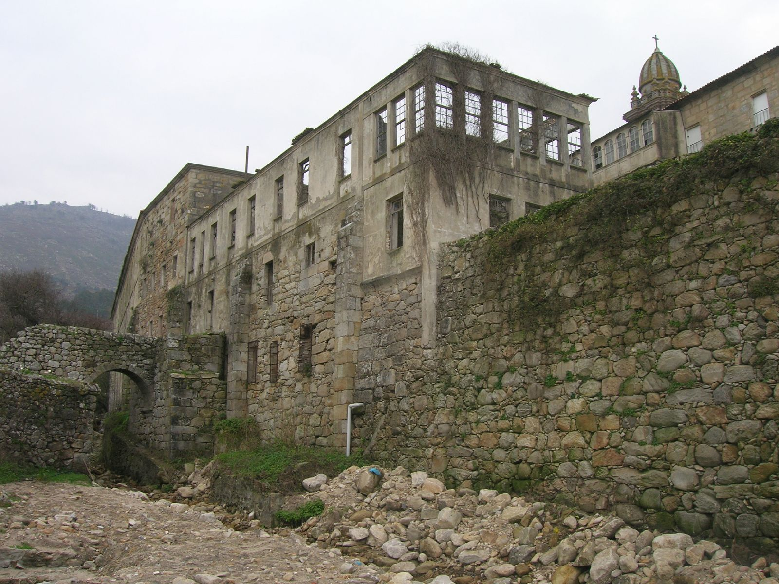 Alzado norte das dependencias monacais do Mosteiro de Santa María de Oia